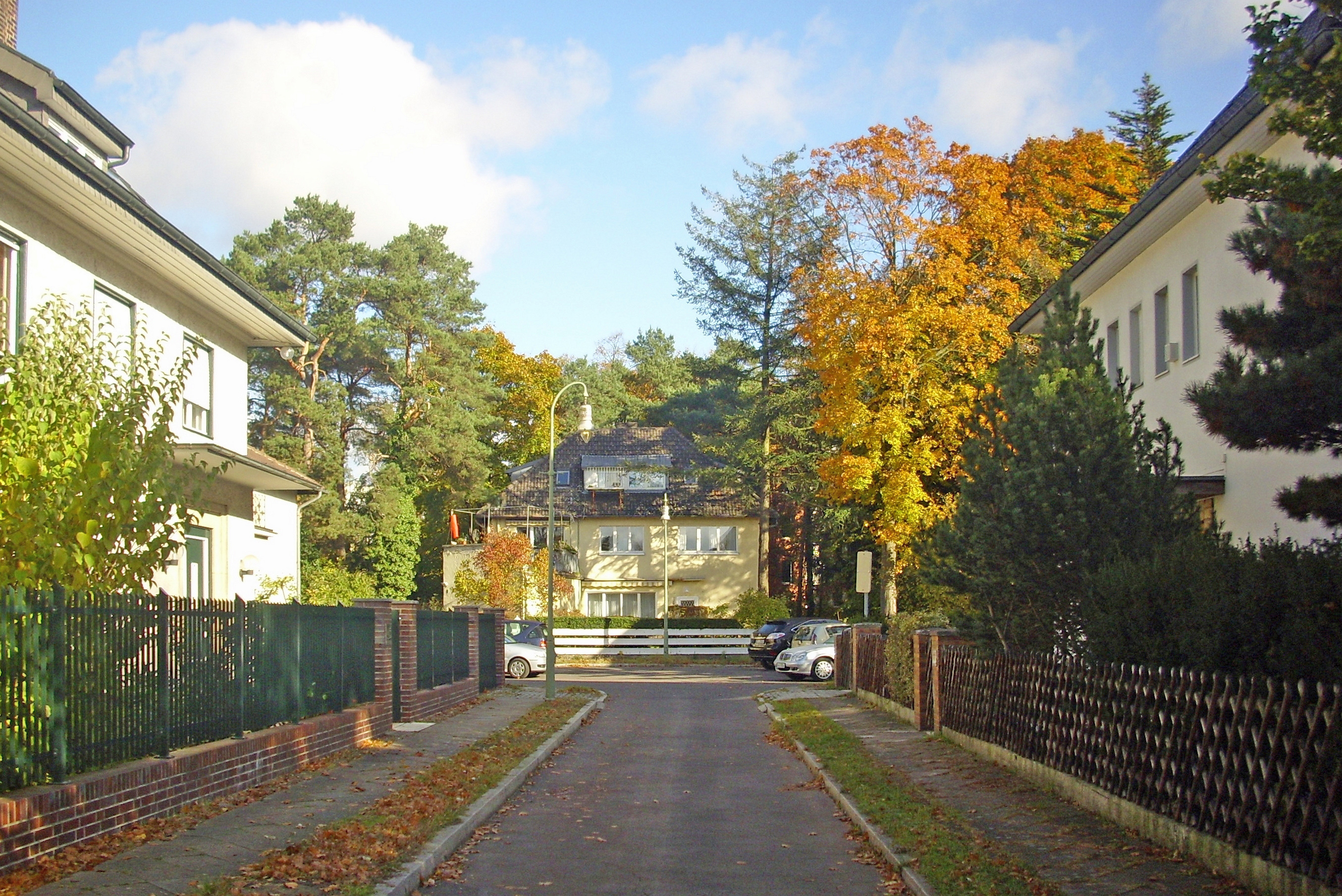 Silingenweg in Berlin. Der Silingenweg ist eine Sackgasse. Die Gasse beginnt an der Wandalenallee.